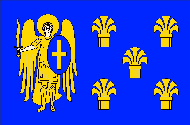 Прапор Миронівського району (Київська область)